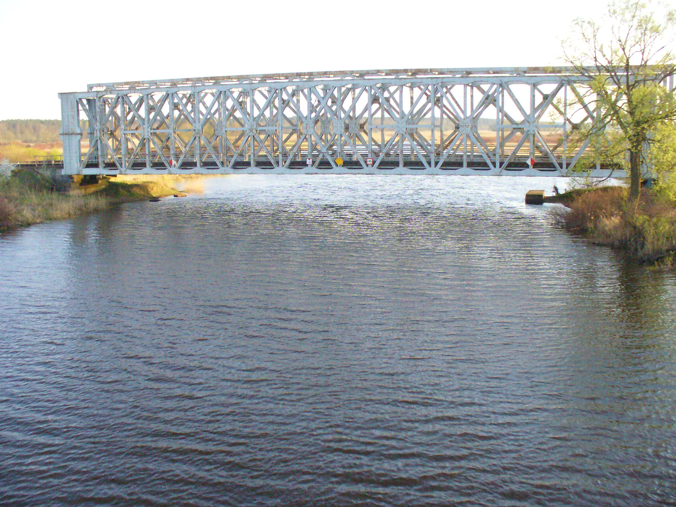 most kolejowy na rzece Biebrzy